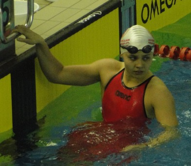 Alicja Tchórz Zdjęcie wykonane podczas Grand Prix Polski w pływaniu, Kraków 2012.